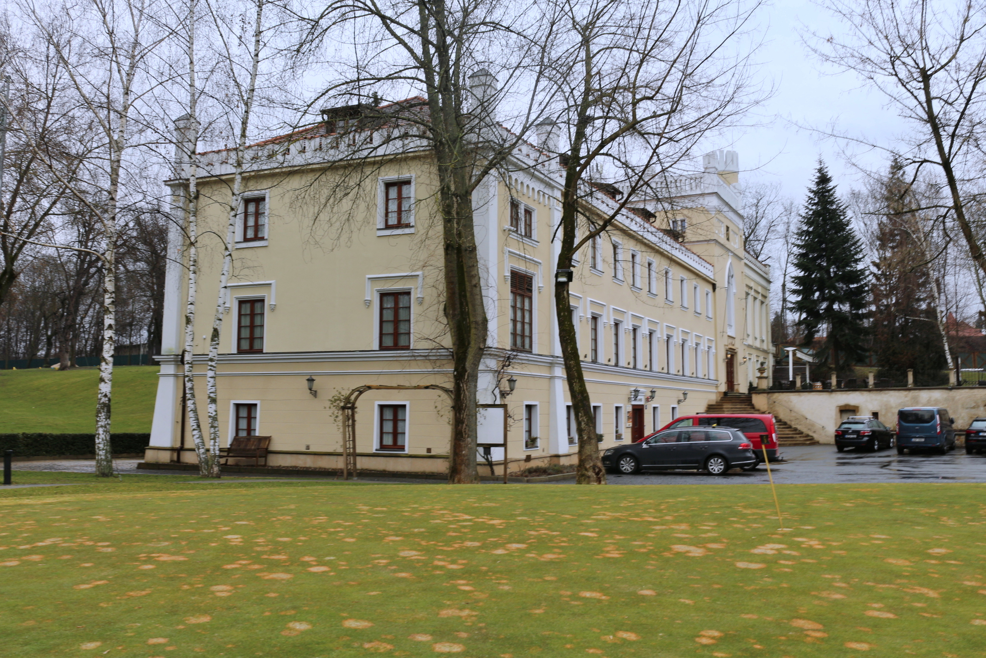 Krčský zámek sv. Havel